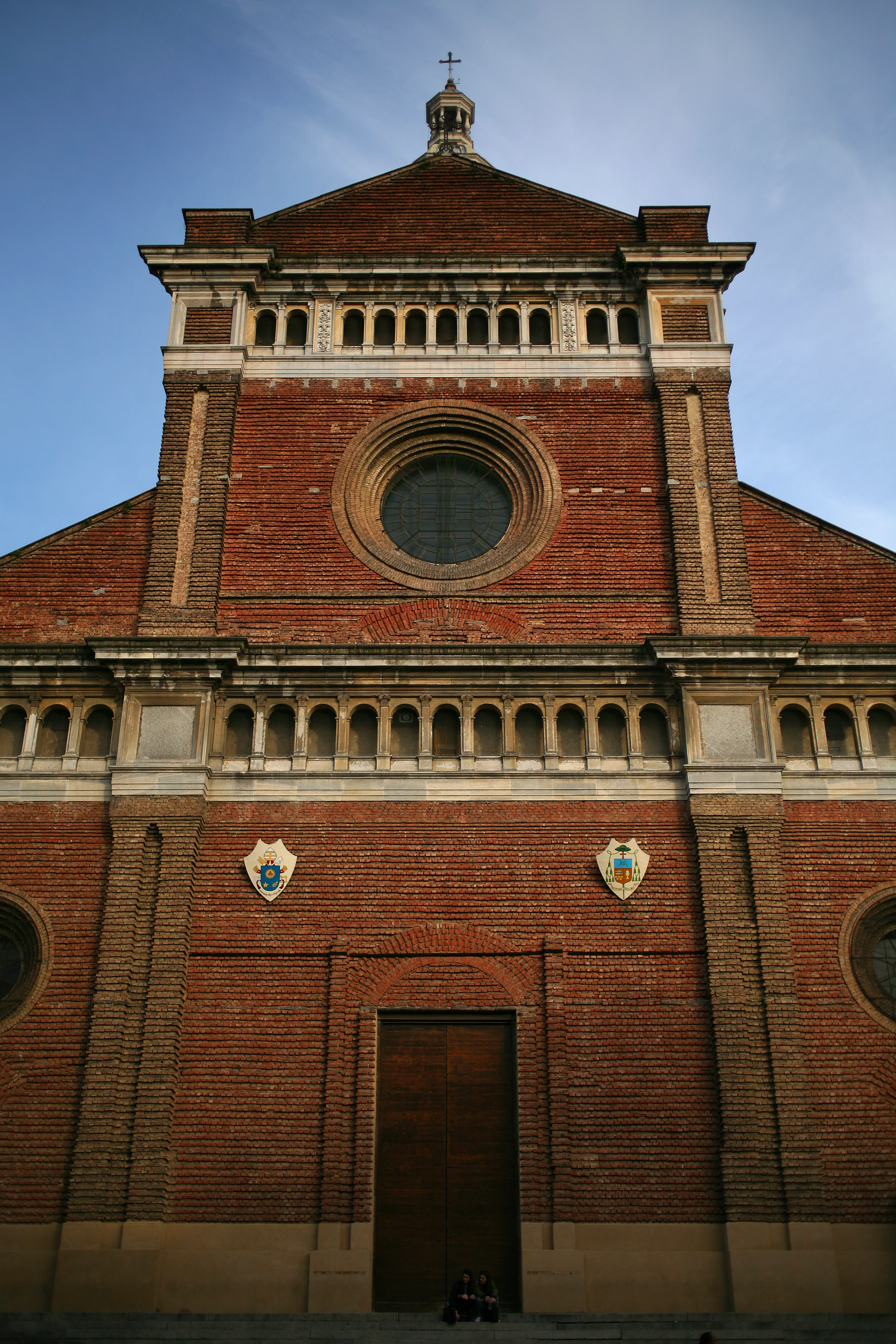 Duomo di Pavia, particolare prospettico di sezione della facciata. Architetto Carlo Maciachini, 1895-1898